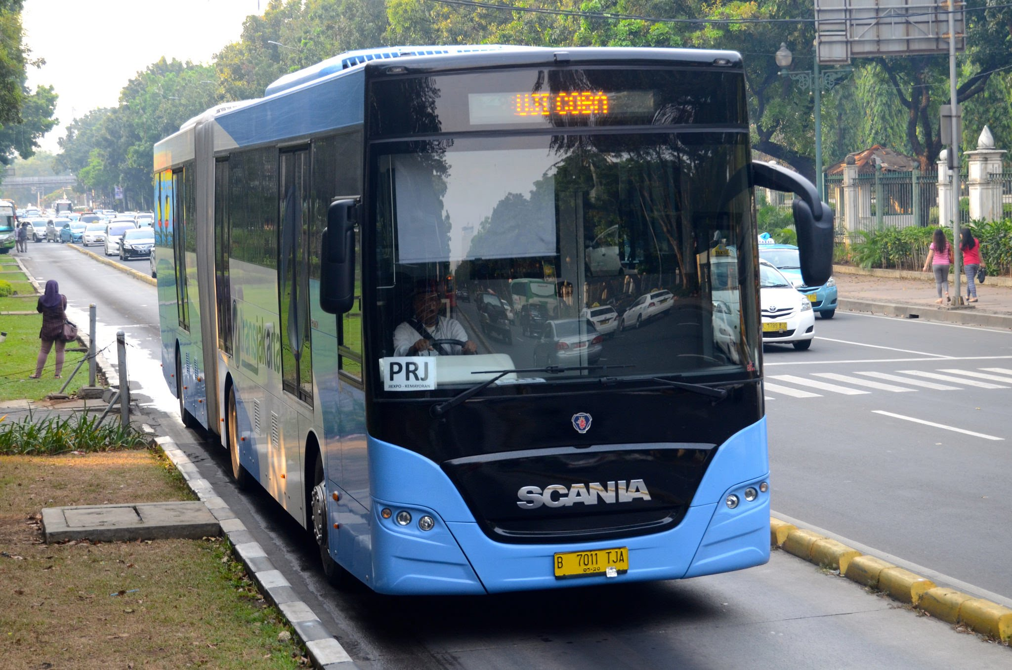 TransJakarta Scania K340IA Euro 6